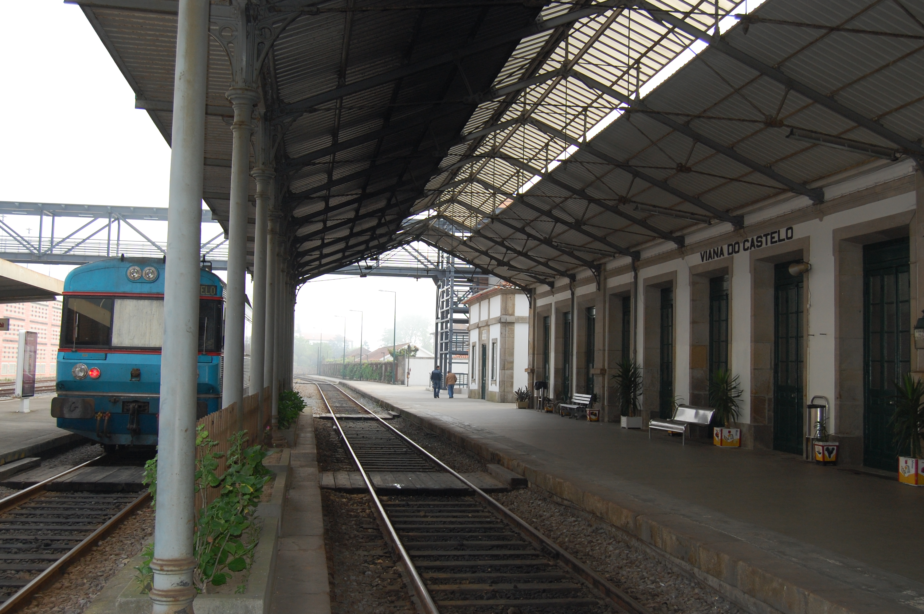 Estação de comboios de Viana do Castelo.